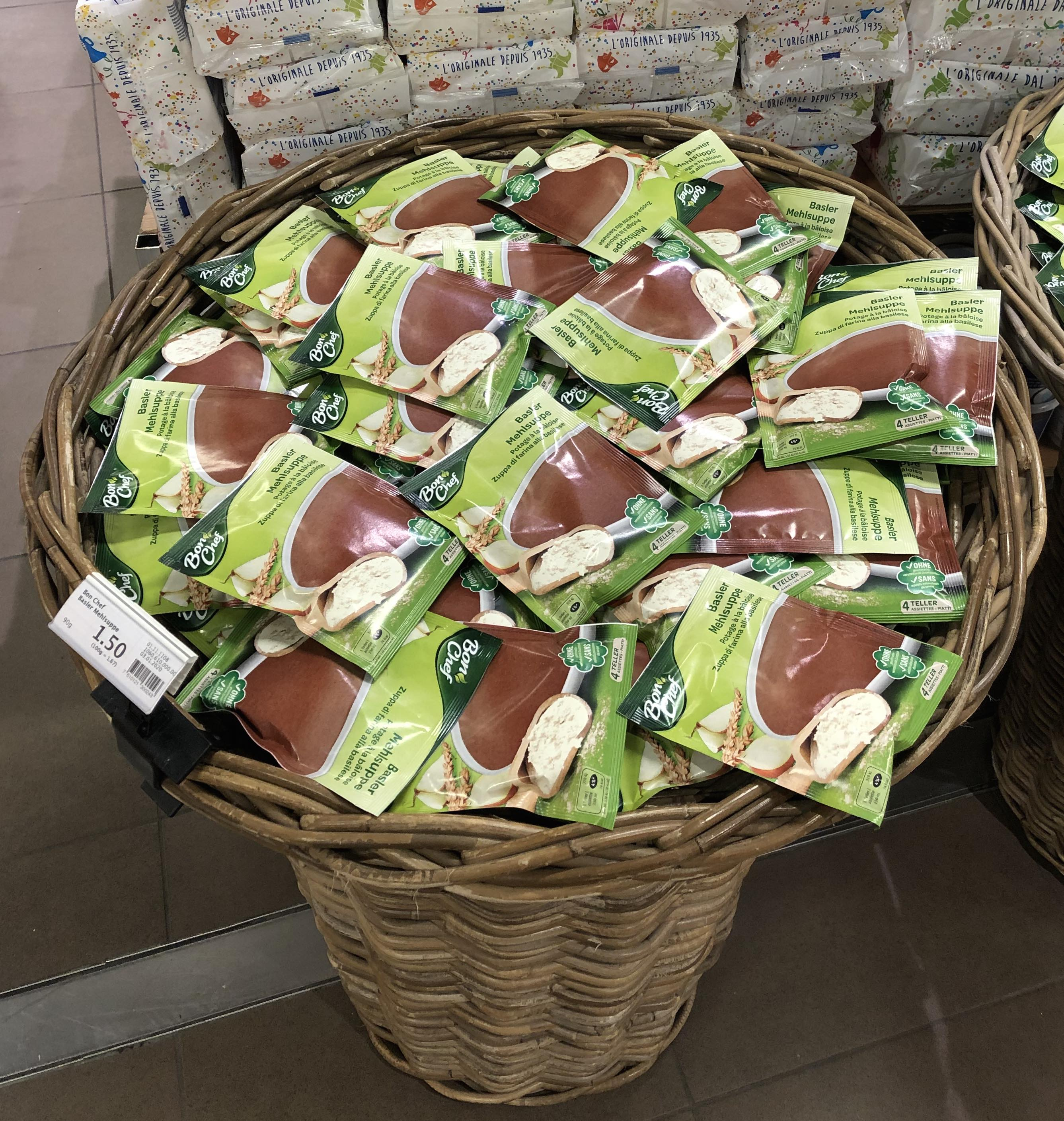 Korb mit Tütensuppen (Basler Mehlsuppe), dahinter Schachteln mit "Fasnachtskiechli" (Schmalzgebäck mit Puderzucker). Auslage in einem Basler Lebensmittelgeschäft (Migros) aufgebaut in der Zeit vor der Basler Fasnacht. Mehlsuppe und Fasnachtskiechli sind typische Speisen der Fasnacht und der Vorfasnachtszeit.